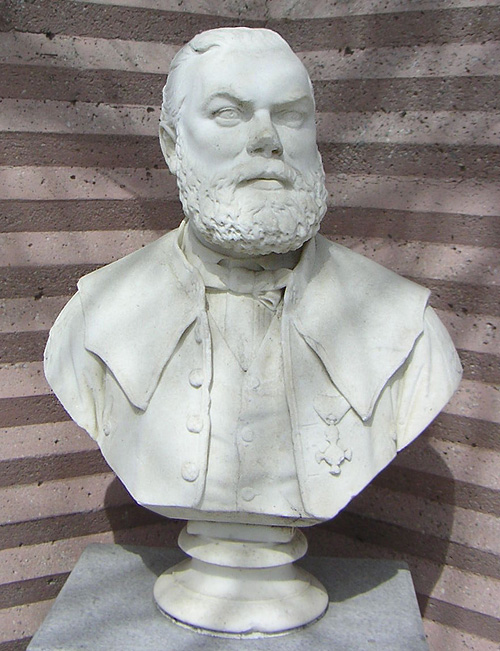 Büste des Bergverwalters und Historikers Friedrich Münichsdorfer in Hüttenberg, April 2005